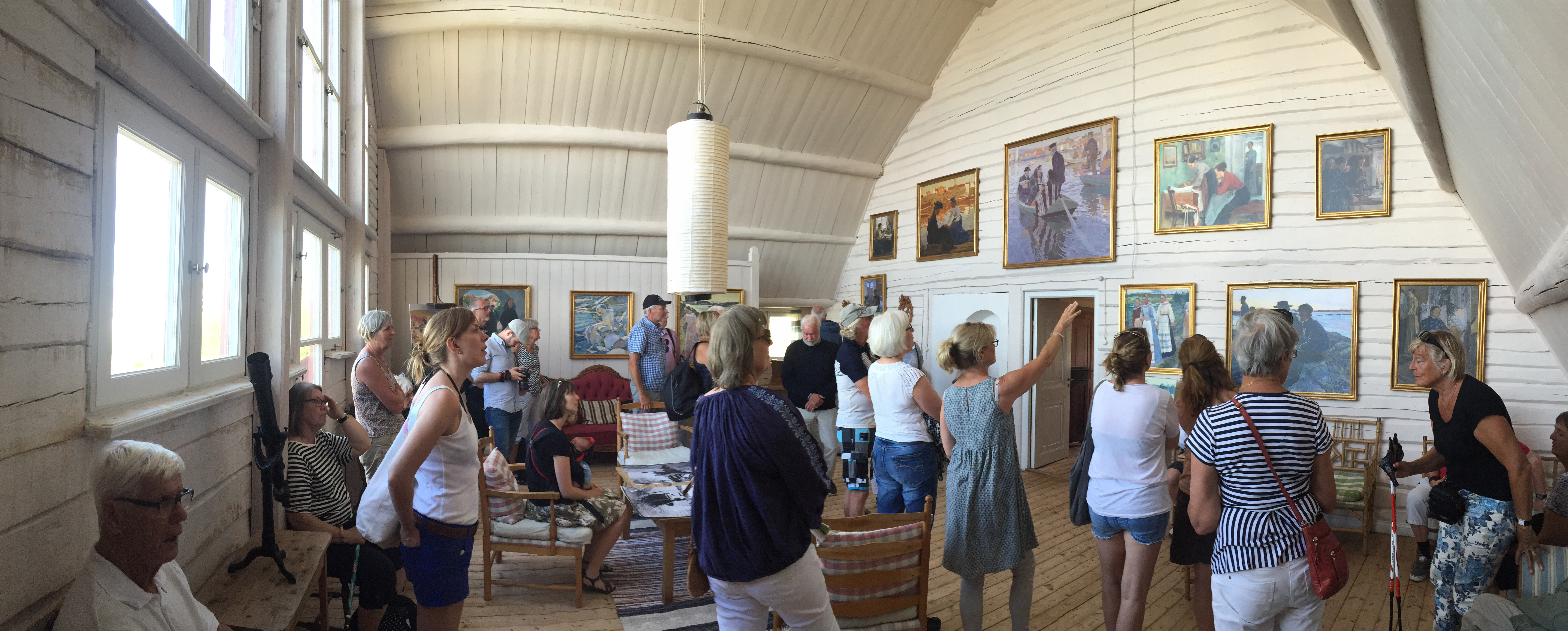 Panorama, Carl Wilhelsons ateljé